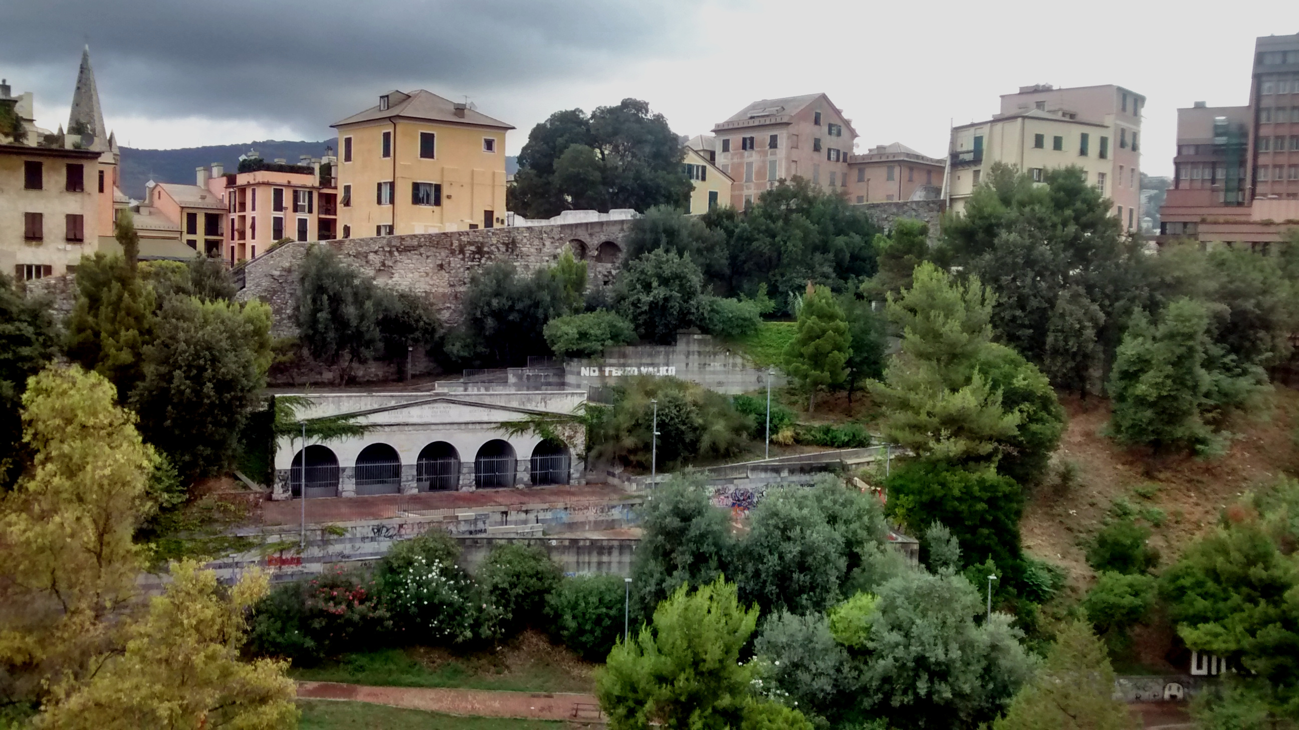 Genova, i Giardini Baltimora, comunemente noti come "Giardini di Plastica", con i lavatoi del Barabino sovrastati dai resti delle mura del Colle